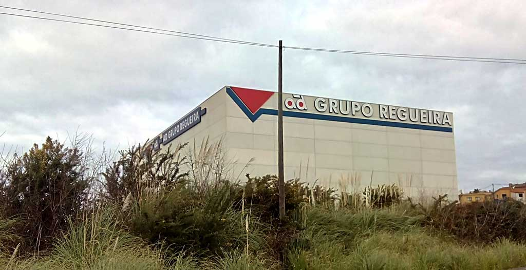 Sede de AD Regueria en Sabón.